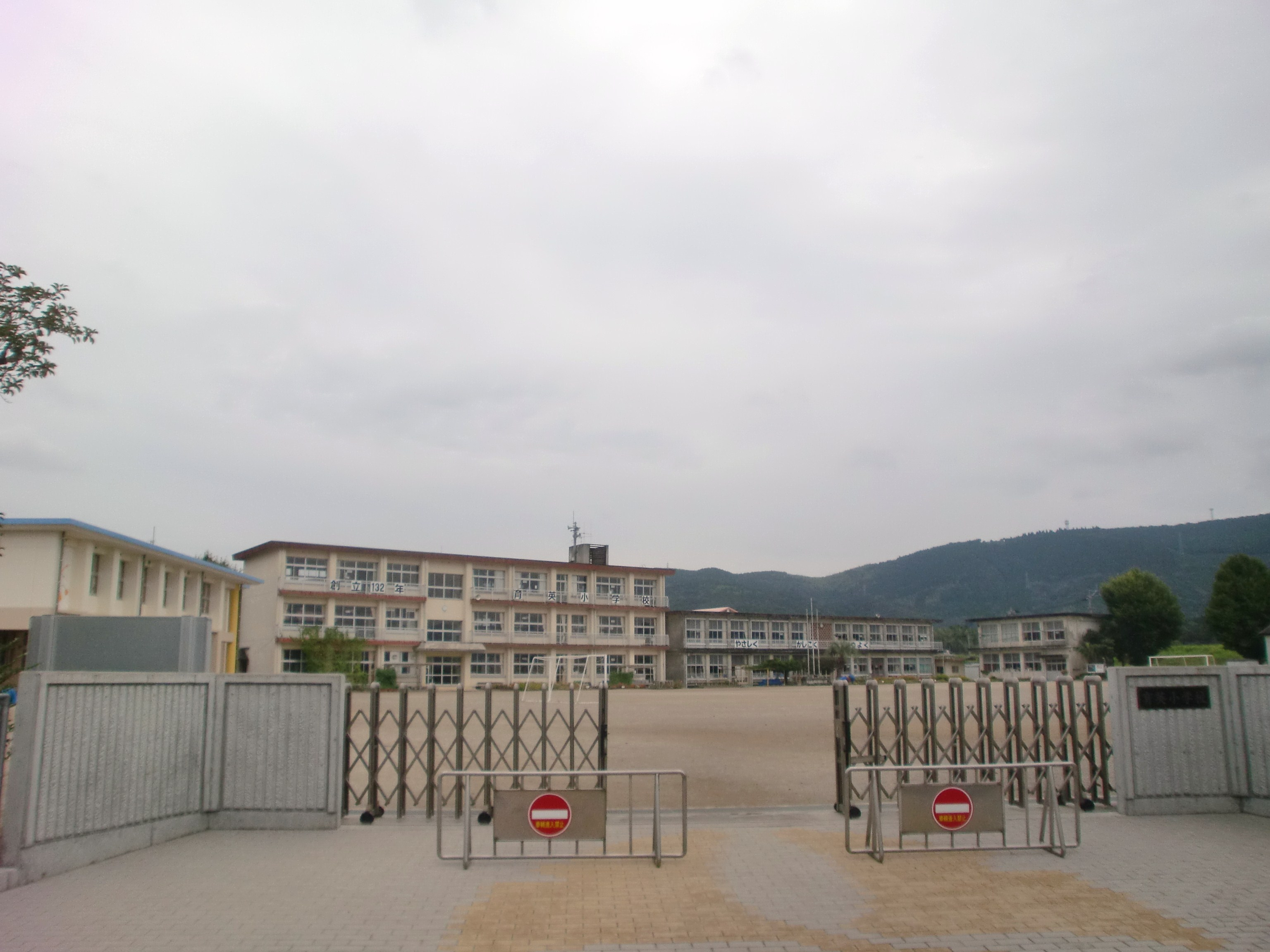 薩摩川内市立育英小学校の外観。